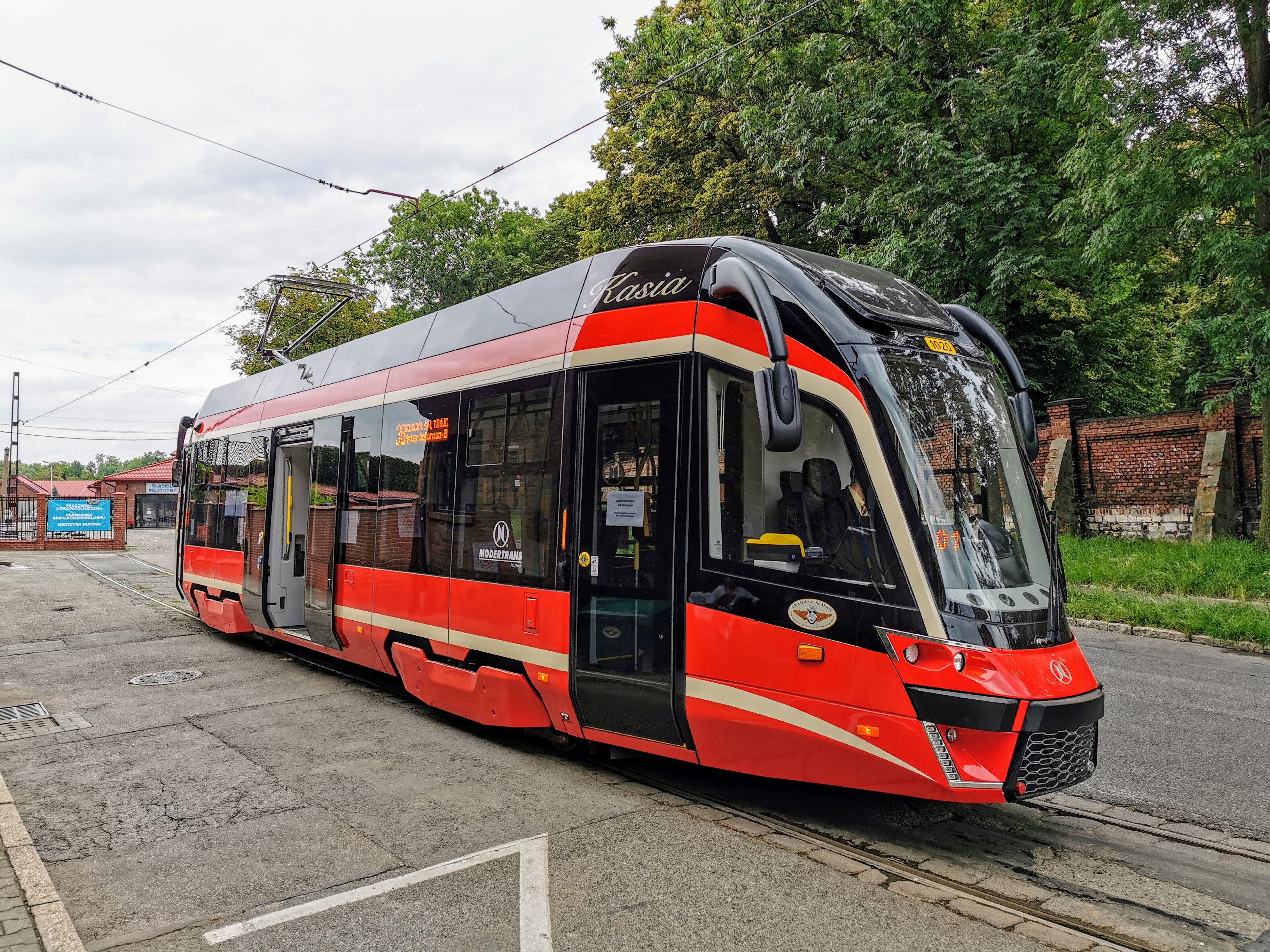 Tramwaj Moderus Beta MF 11 AC BD na przystanku Powstańców Warszawskich w Bytomiu podczas pierwszego dnia na linii 38